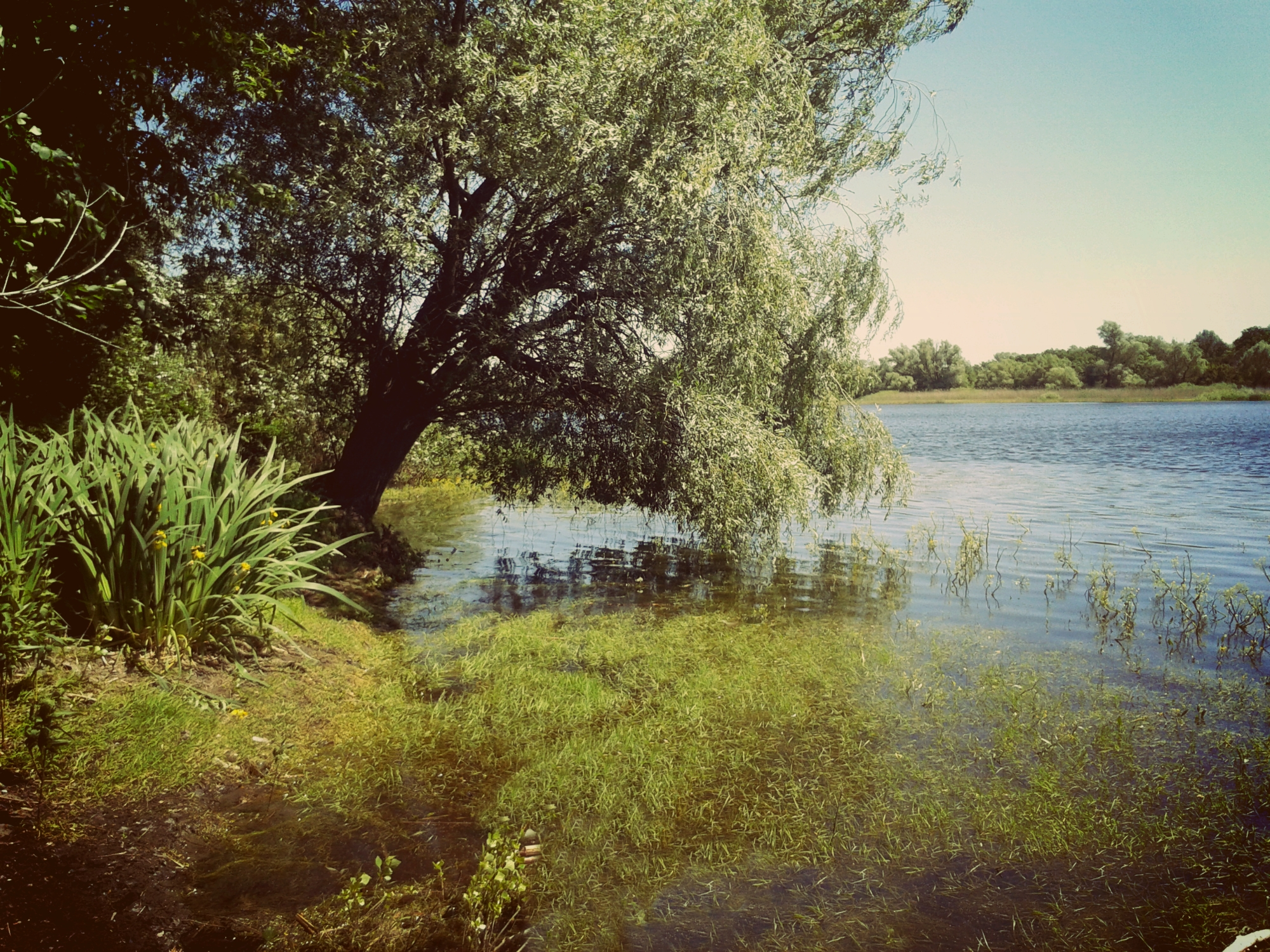 Озеро Ильмень, Даниловский район This image is related to the protected area of Russia number 3420074